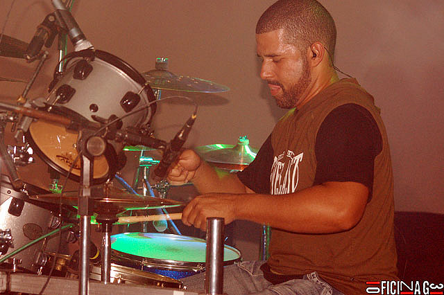 Alexandre Aposan, baterista do Oficina G3